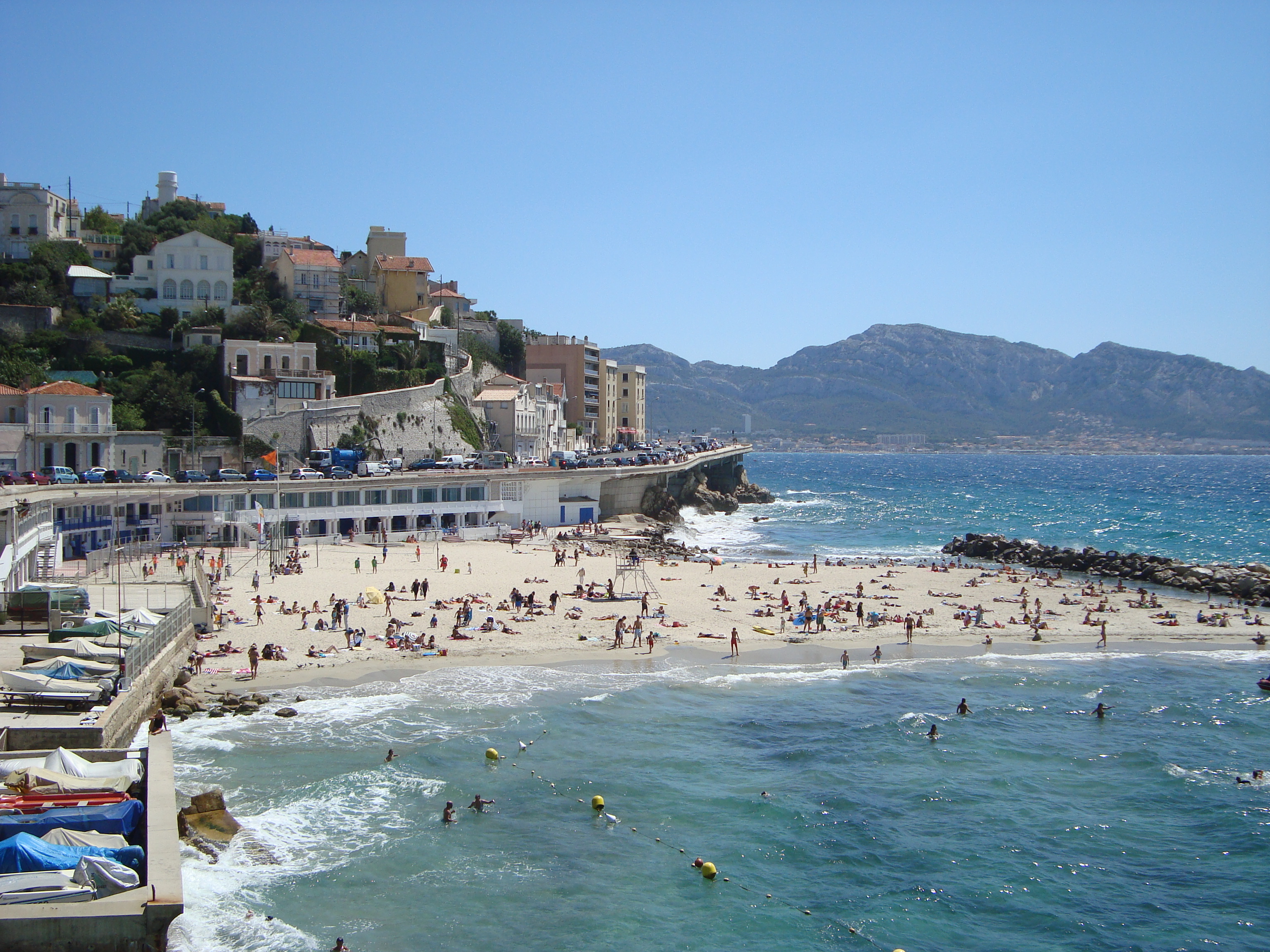 Marseille